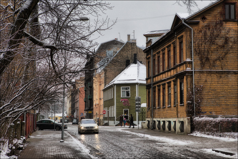 Strēlnieku iela (Riga)